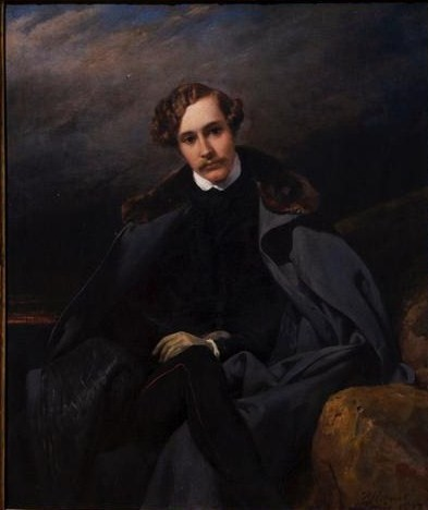 Александр Иванович Барятинский (1815—1879).